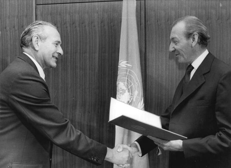 ADN-ZB Spremberg 21.9.73-New York: Ständiger UNO-Vertreter der DDR überreichte Beglaubigungsschreiben Der von der Regierung der DDR ernannte Ständige Vertreter der Deutschen Demokratischen Republik bei den Vereinten Nationen, Peter Florin, Stellvertreter des Ministers für Auswärtige Angelegenheiten und Außerordentlicher und Bevollmächtigter Botschafter (links), überreichte am 20.9.73 in New York UNO-Generalsekretär Dr. Kurt Waldheim sein Beglaubigungsschreiben.